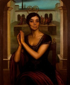 La Niña de los Peines. Julio Romero de Torres. 1917-1918. Óleo sobre lienzo. 101 x 81 cm.